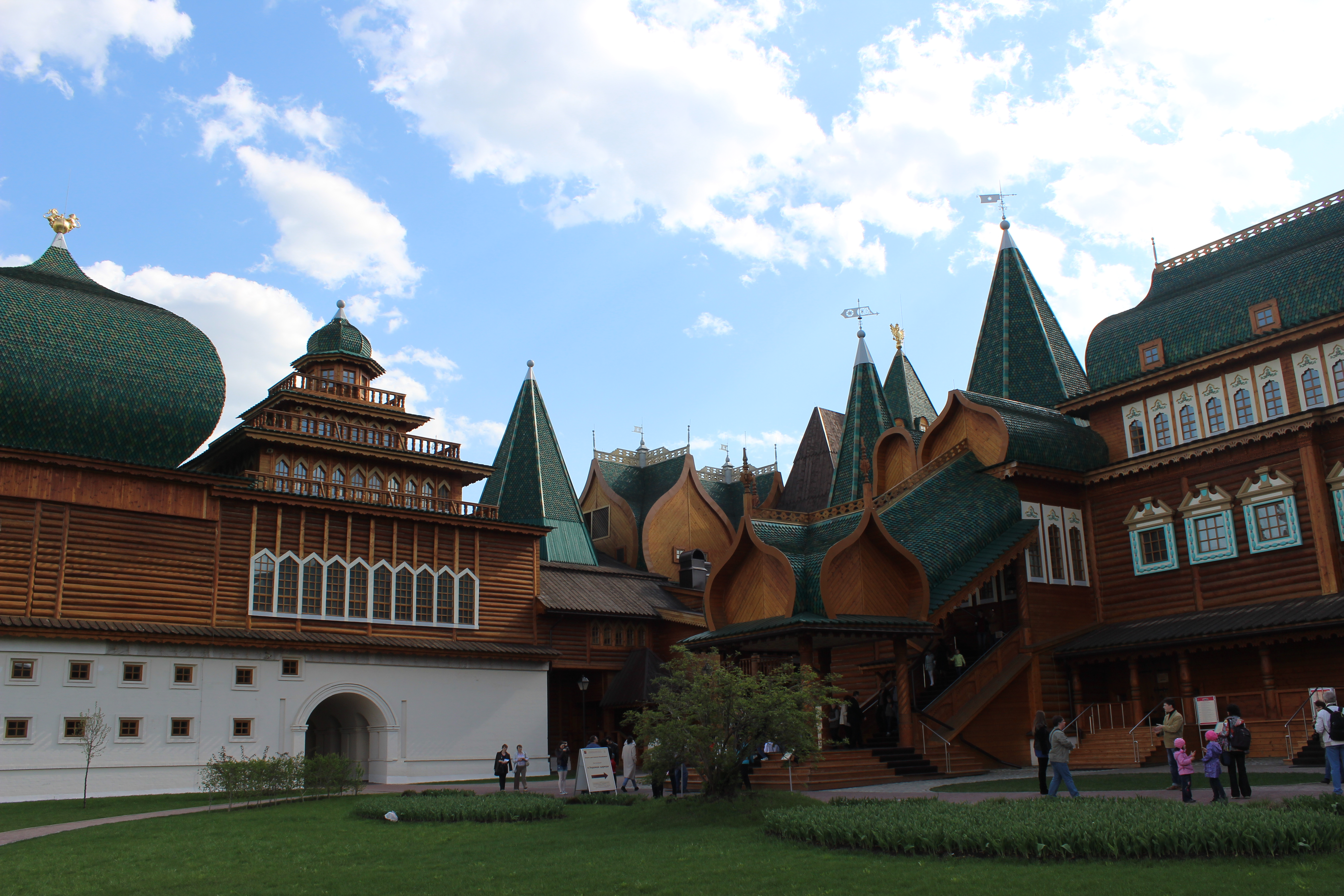 Усадьба «Коломенское» (Москва и Московская область, Москва, Андропова проспект, 31, 39)